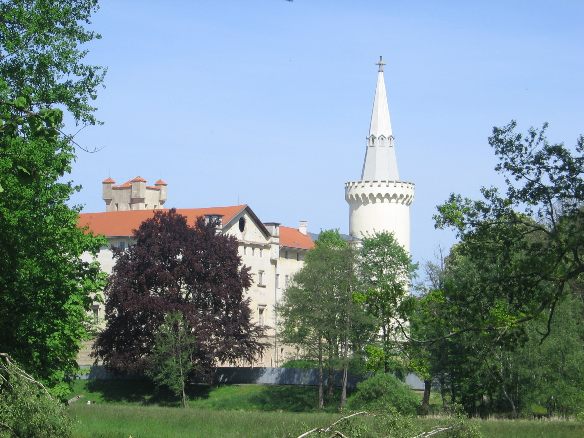 Zámek Bor u Tachova